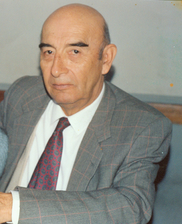 Carlos Téllez Orías